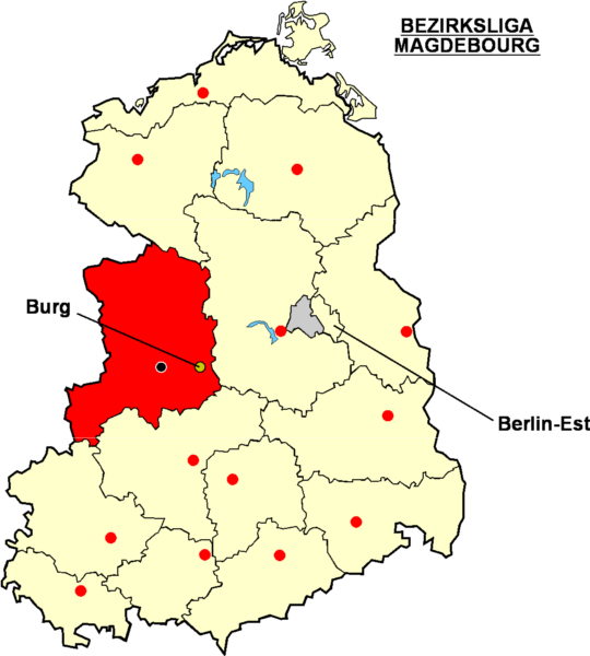 Localisation de Burg dans la "Bezirksliga Magdebourg" Catégorie:Logo de clubs de football - Allemagne